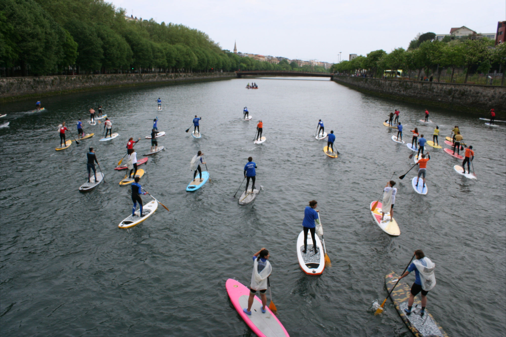 Urumea Olatu Talka